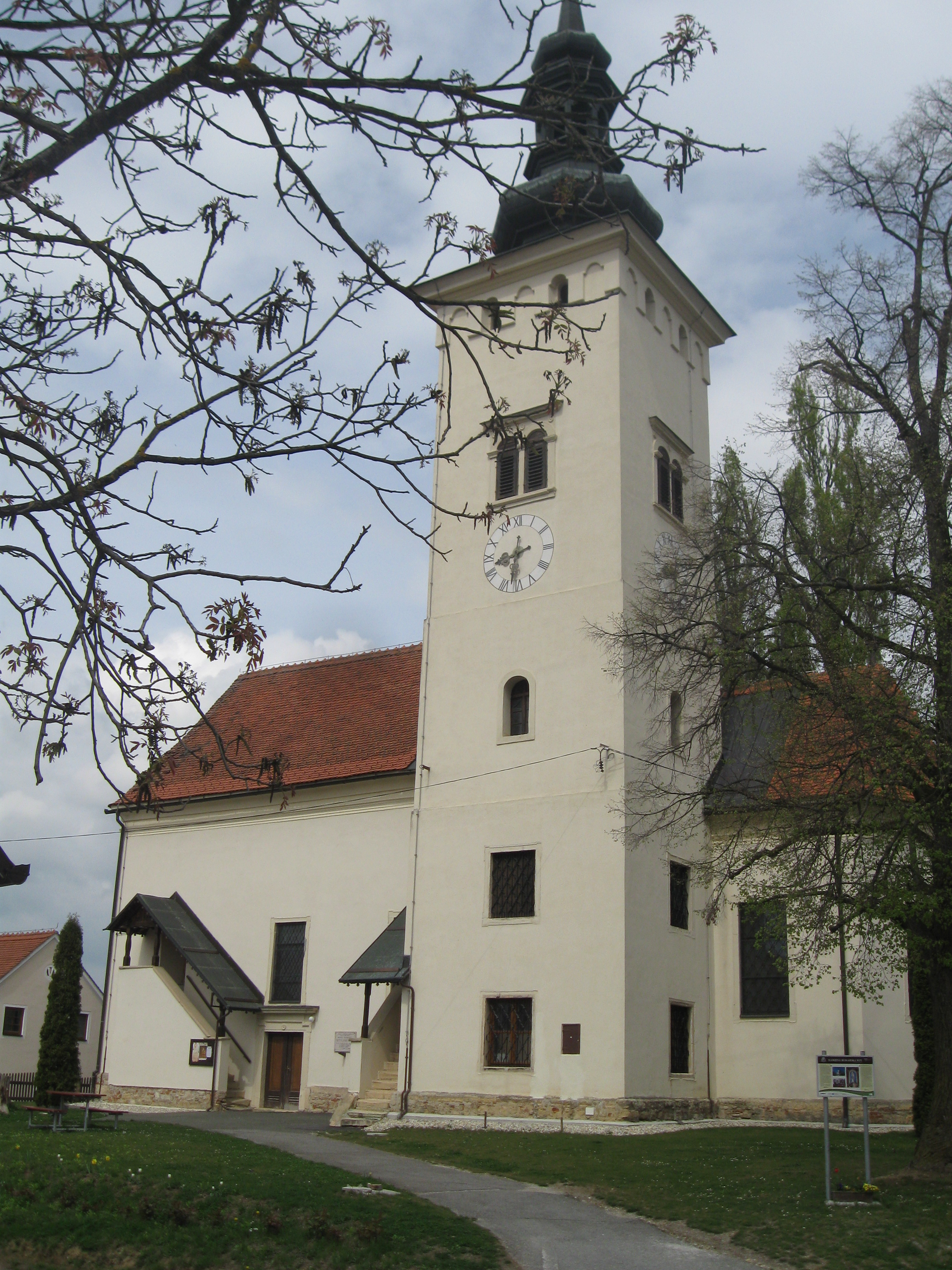 Cerkev Marijinega rojstva v Negovi.